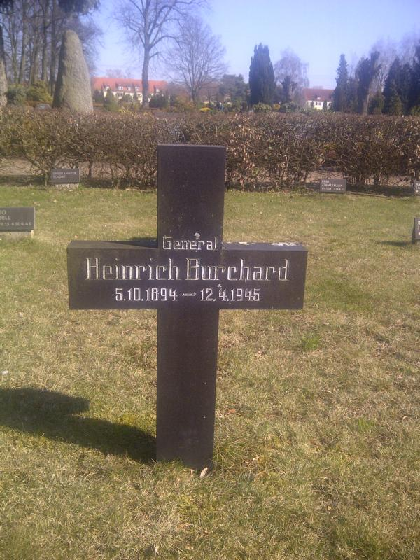 Grabstein auf den städtischen Friedhof von Hagenow/Meckl.